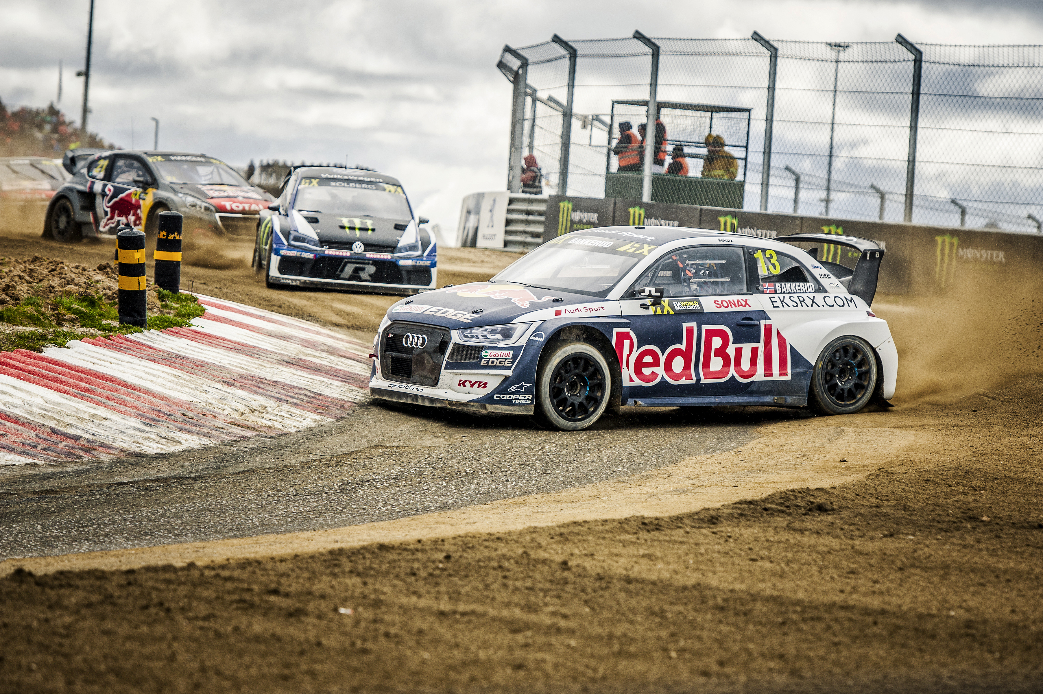 _DSC6838